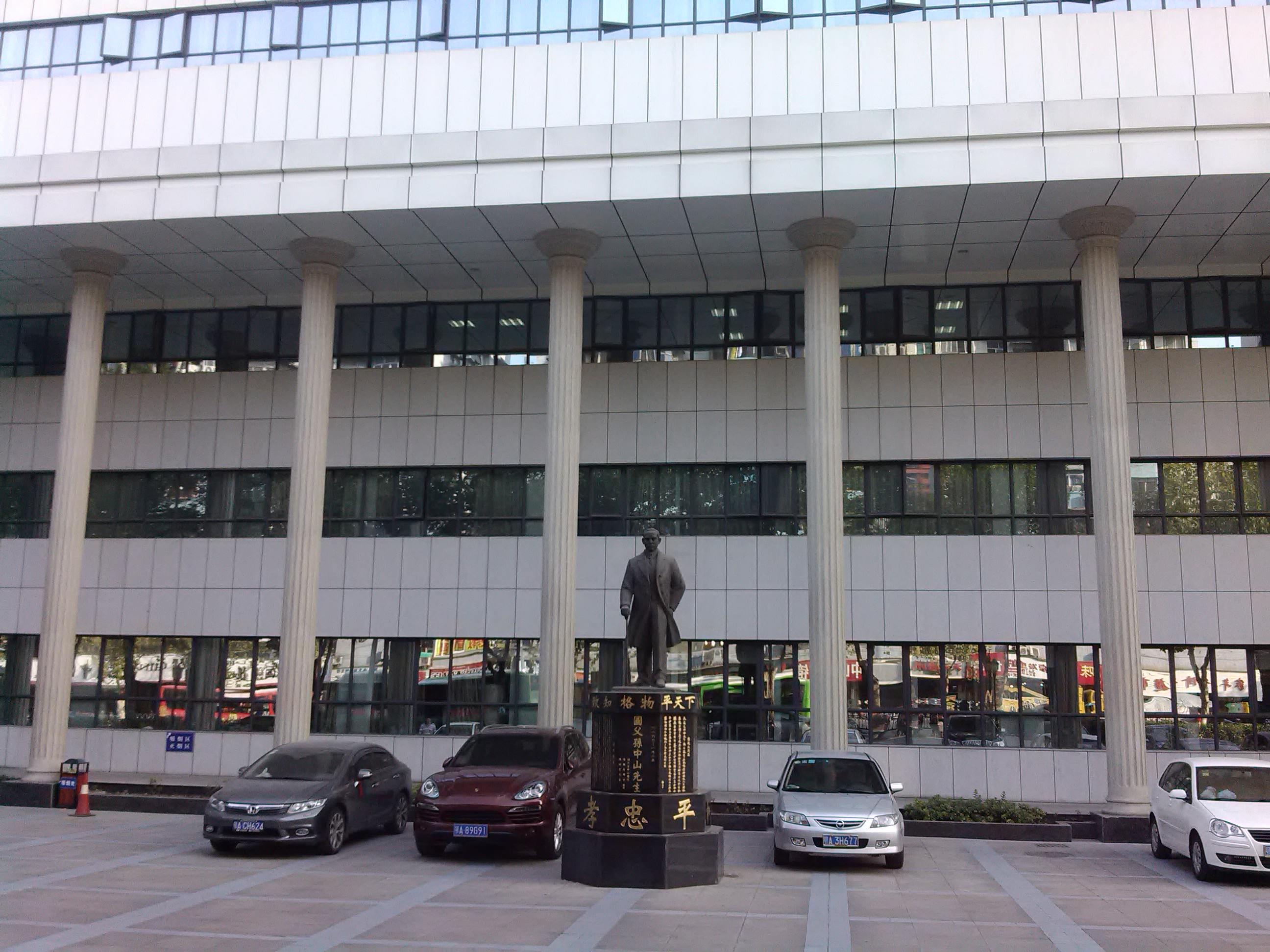 湖北省中山医院孙中山铜像